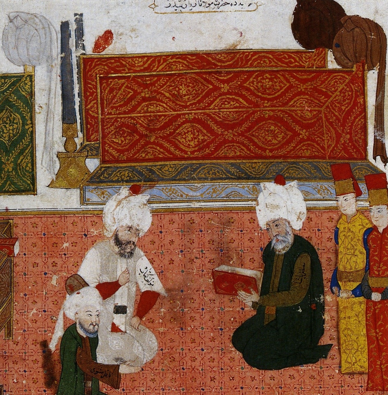 Lala Mustafa Paşa'nın Mevlana türbesini ziyareti